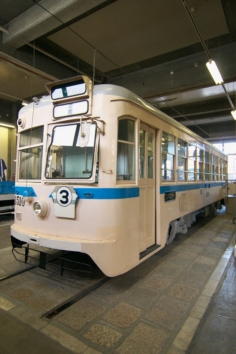 横浜市電1500形（1510）。横浜市電保存館の保存車。